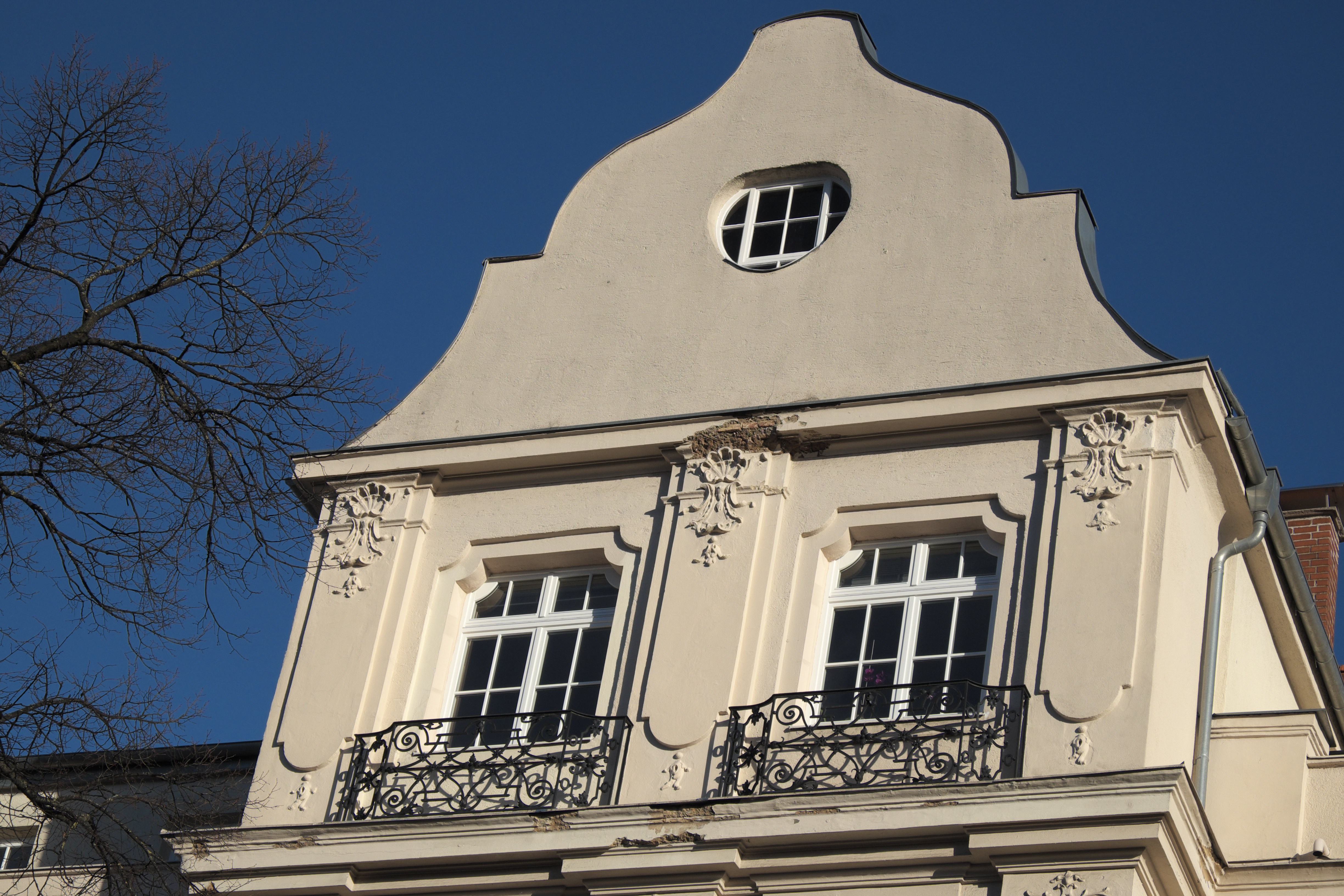 Mietshaus am Kaiser-Ludwig-Platz 5 in der Ludwigsvorstadt im Stadtbezirk Ludwigsvorstadt-Isarvorstadt in München (Bayern/Deutschland), 1895 von Emanuel von Seidl erbaut